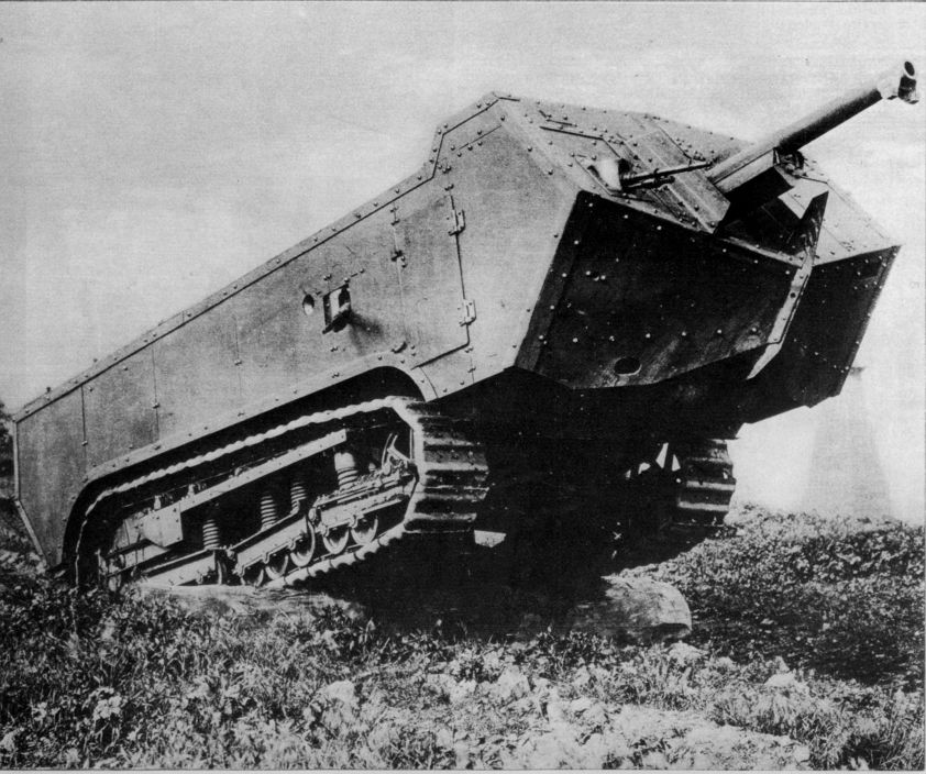 Franse Schneider-tank